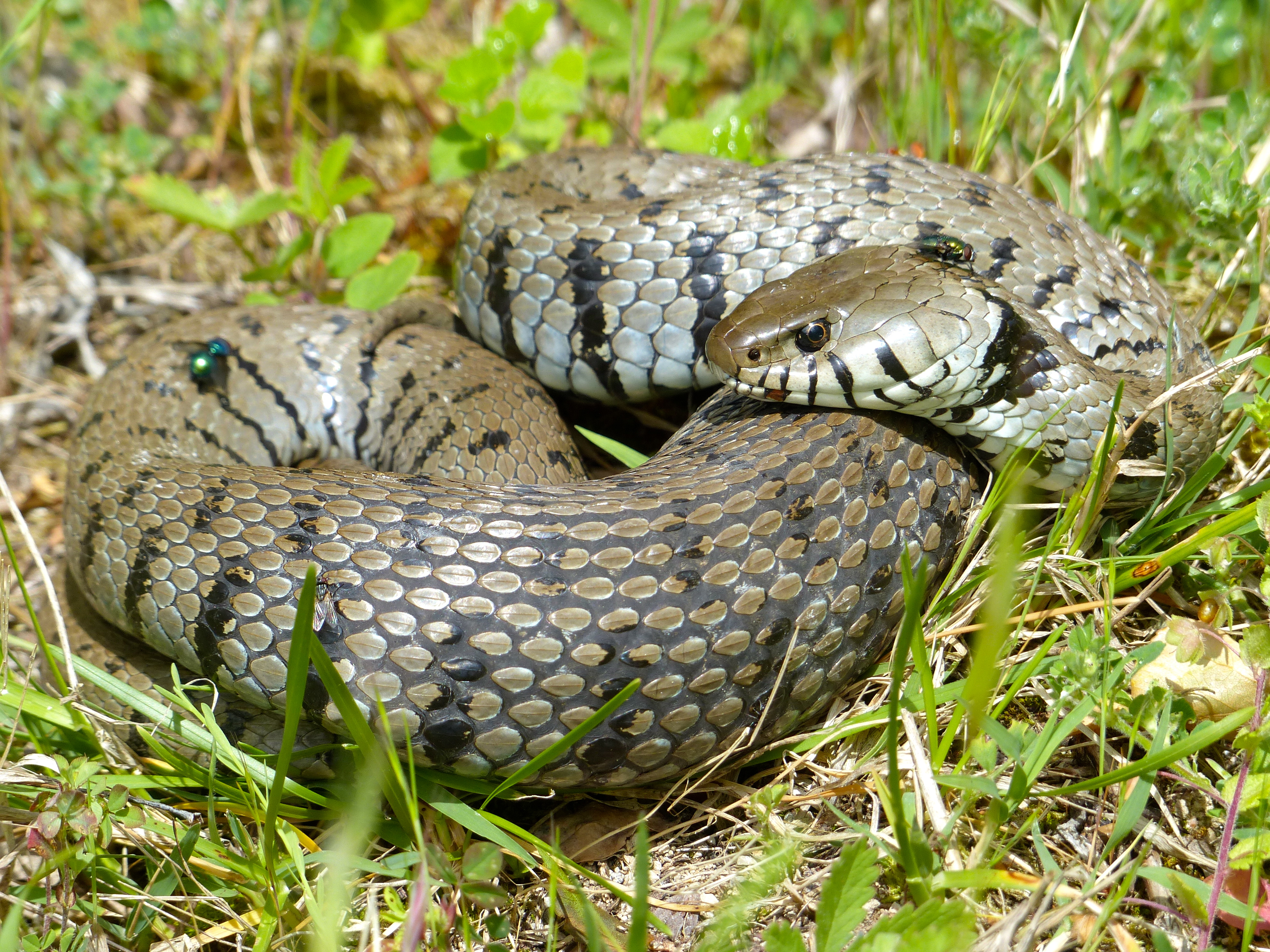 Avène, Hérault, FRANCE